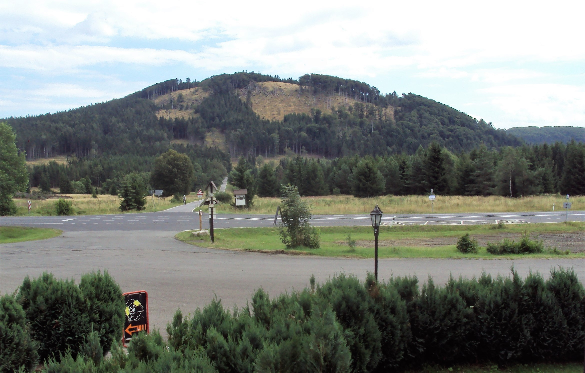 Pohled na Bouřný z okna hospody Nová Huť